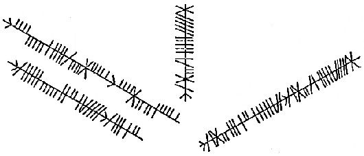 Nachzeichnung der Ogham-Inschrift auf der Rückseite der Ballyspellan-Fibel (CIIC 27). Die Ringfibel wurde 1806 durch einen Bauern beim Graben auf dem Hügel im Townland Ballyspellan, Grafschaft Kilkenny, Irland, entdeckt. Aufgrund der Art der Verzierungen wird die Fibel ins 9. Jahrhundert n. Chr. datiert. Sie wird im Nationalmuseum von Irland in Dublin aufbewahrt. Übertragung der Ogham-Zeichen Zwei parallele Zeilen links unten, Leserichtung jeweils von links nach rechts: CNAEMSECH CELLACH (obere Zeile) und MINODOR MUAD (untere Zeile) Senkrechte Zeile in der Mitte, Leserichtung von unten nach oben: MAELMAIRE Rechte Zeile, Leserichtung von links nach rechts: MAELUADAIG MAELMAIRE